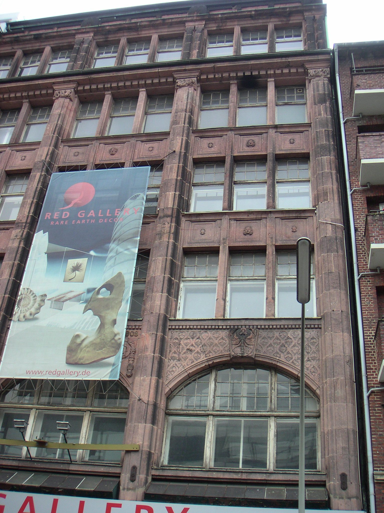 Kontorhaus Rödingsmarkt 19This is a photograph of an architectural monument.